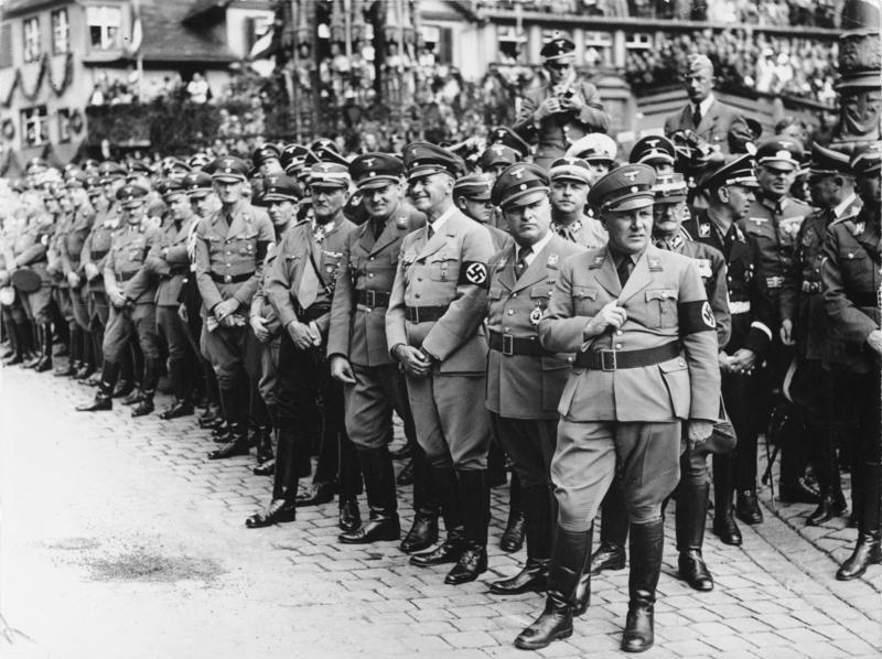 Nürnberg, Reichsparteitag der NSDAP Zentralbild 10. Reichsparteitag der NSDAP vom 6.-12.9.1938 in Nürnberg. UBz: die Reichsleiter der NSDAP als Zuschauer des Vorbeimarsches vor Adolf Hitler. Von rechts: Martin Bormann, Robert Ley, Wilhelm Frick, Hans Frank, Franz Ritter von Epp, Dr. Joseph Goebbels und Walter Buch. 1938 Abgebildete Personen: Buch, Walter: Major, Reichsleiter, Vorsitzender des Obersten Gerichtshofs der NSDAP, Deutschland Bormann, Martin: SA, NSDAP, Leiter der Parteikanzlei, Sekretär Hitlers, Deutschland Ley, Robert: Reichsorganisationsleiter, Deutsche Arbeitsfront (DAF), Generalrat der Wirtschaft, Deutschland Frick, Wilhelm Dr.: NSDAP, MdR, Reichsinnenminister, 1946 hingerichtet, Deutschland Frank, Hans Dr.: Jurist, Generalgouverneur von Polen, 1946 hingerichtet, Deutschland Goebbels, Joseph: Reichsminister für Volksaufklärung und Propaganda, Gauleiter Berlin, Deutschland Epp, Franz von Ritter: Reichsstatthalter von Bayern, General, Heer, Deutschland